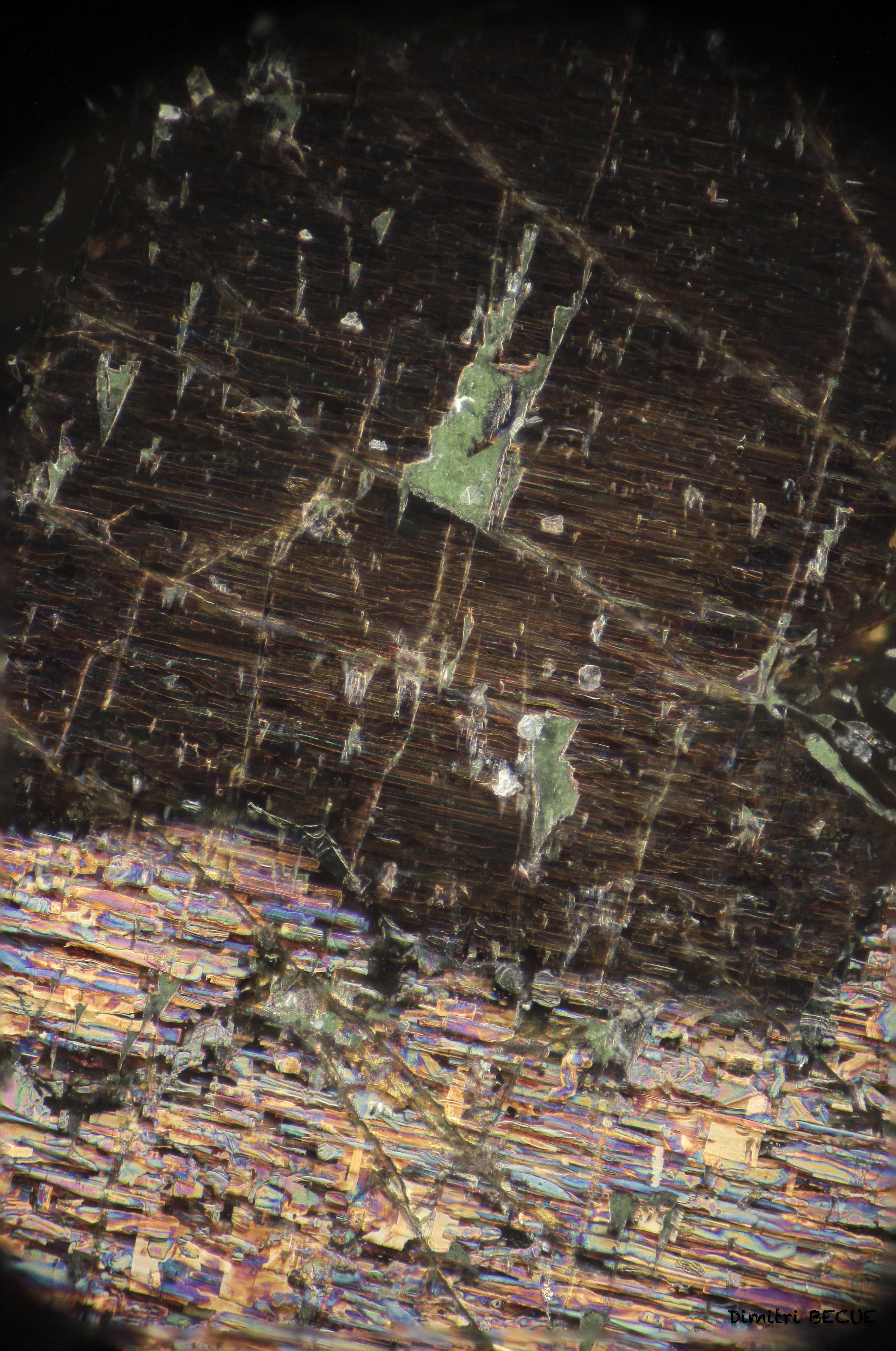 Photo prise au microscope, agrandissement d'un morceau de nuummite x240